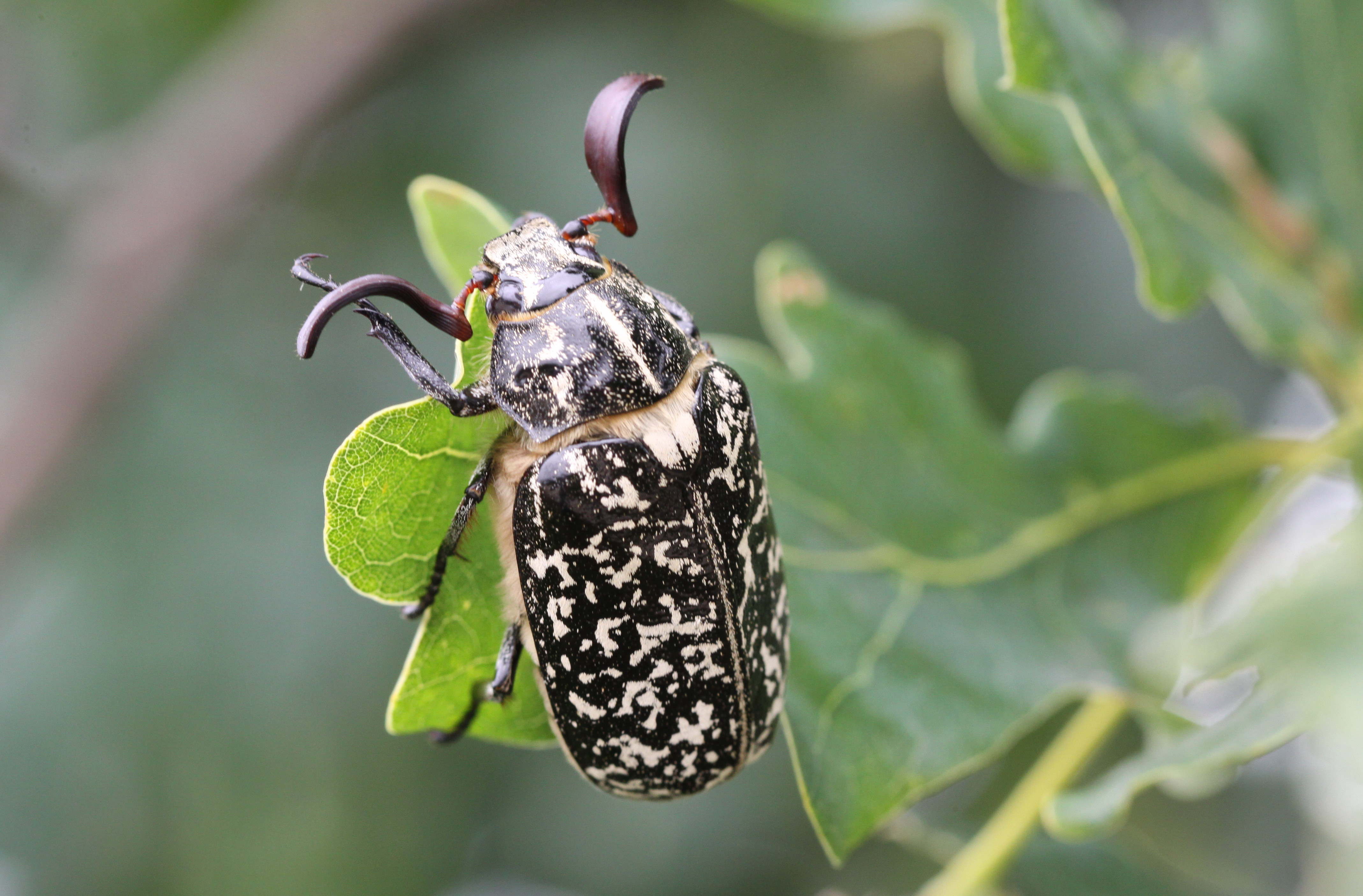 "Polyphylla fullo" - julikever